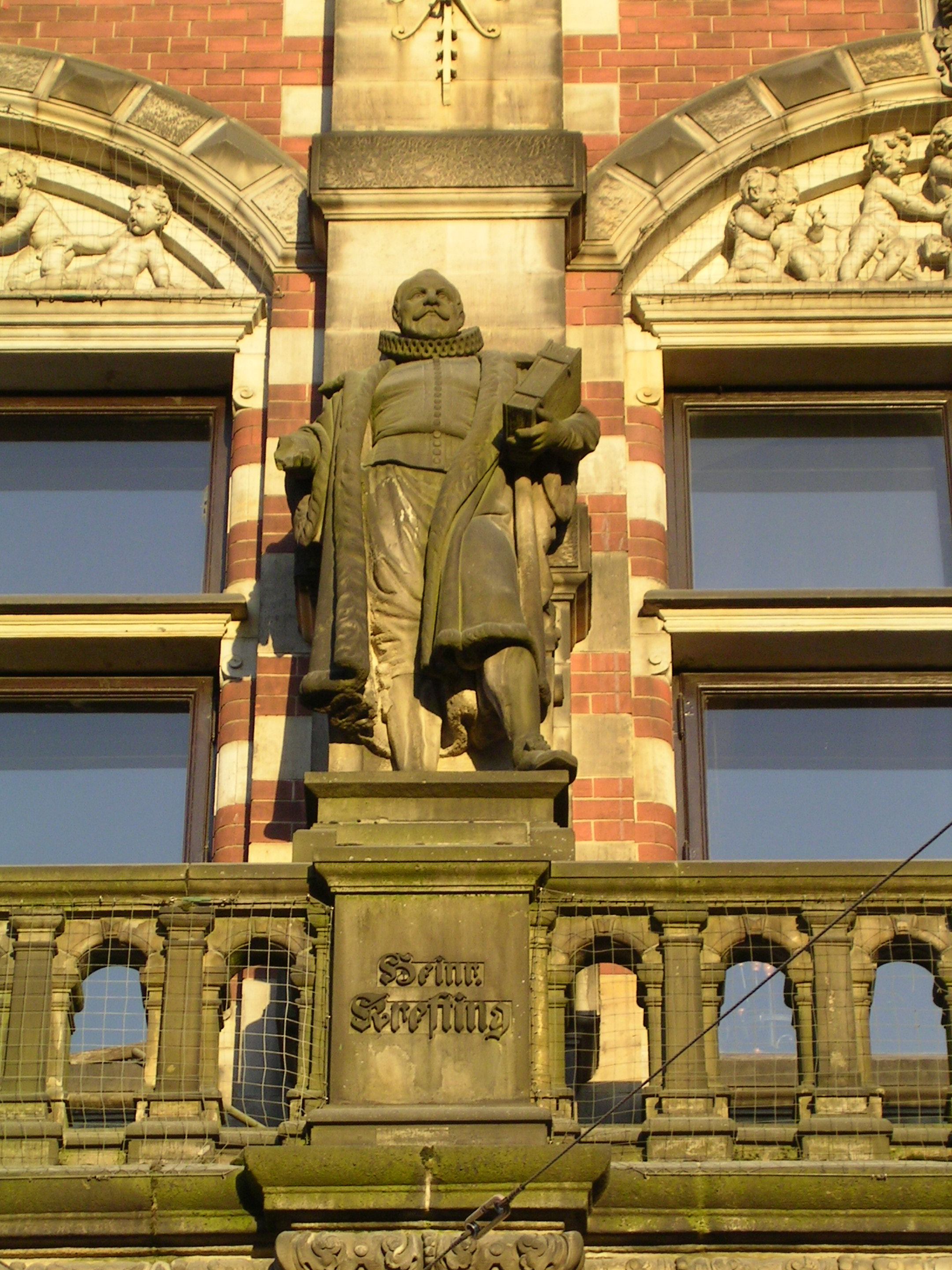 Information Plate on Gerichtsgebaeude Bremen, Germany